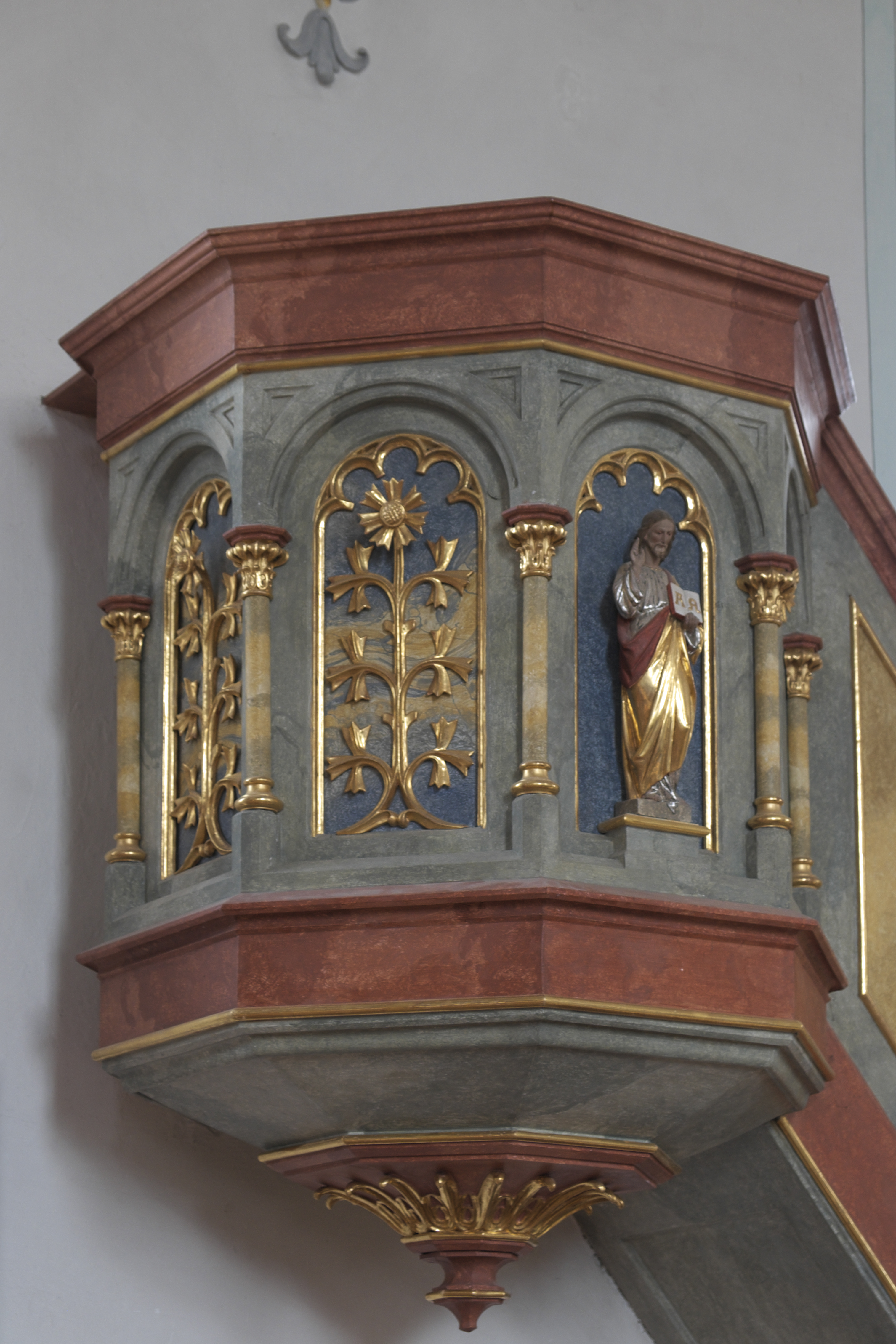 Katholische Pfarrkirche St. Rupert in Oberdießen (Unterdießen) im Landkreis Landsberg am Lech (Bayern/Deutschland), Kanzel von 1879